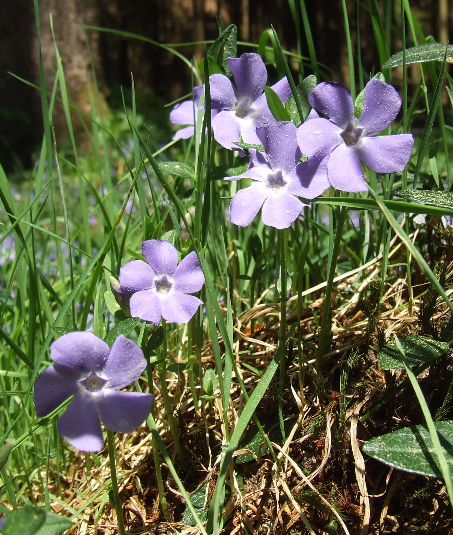 Vinca minor; Dienhauser Weiher, Germany